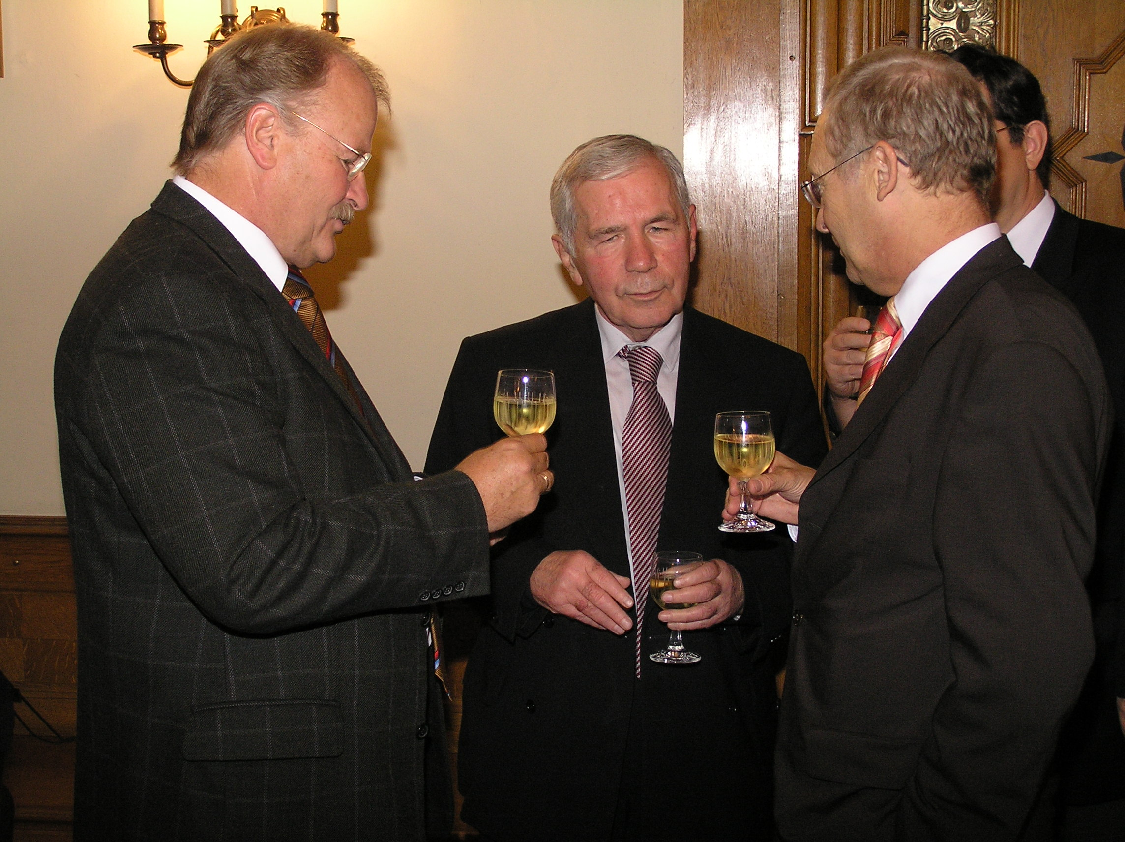 Guyla Horn und Oberbürgermeister Dr. Ivo Holzinger beim Empfang im Memminger Rathaus am 4.10.2005